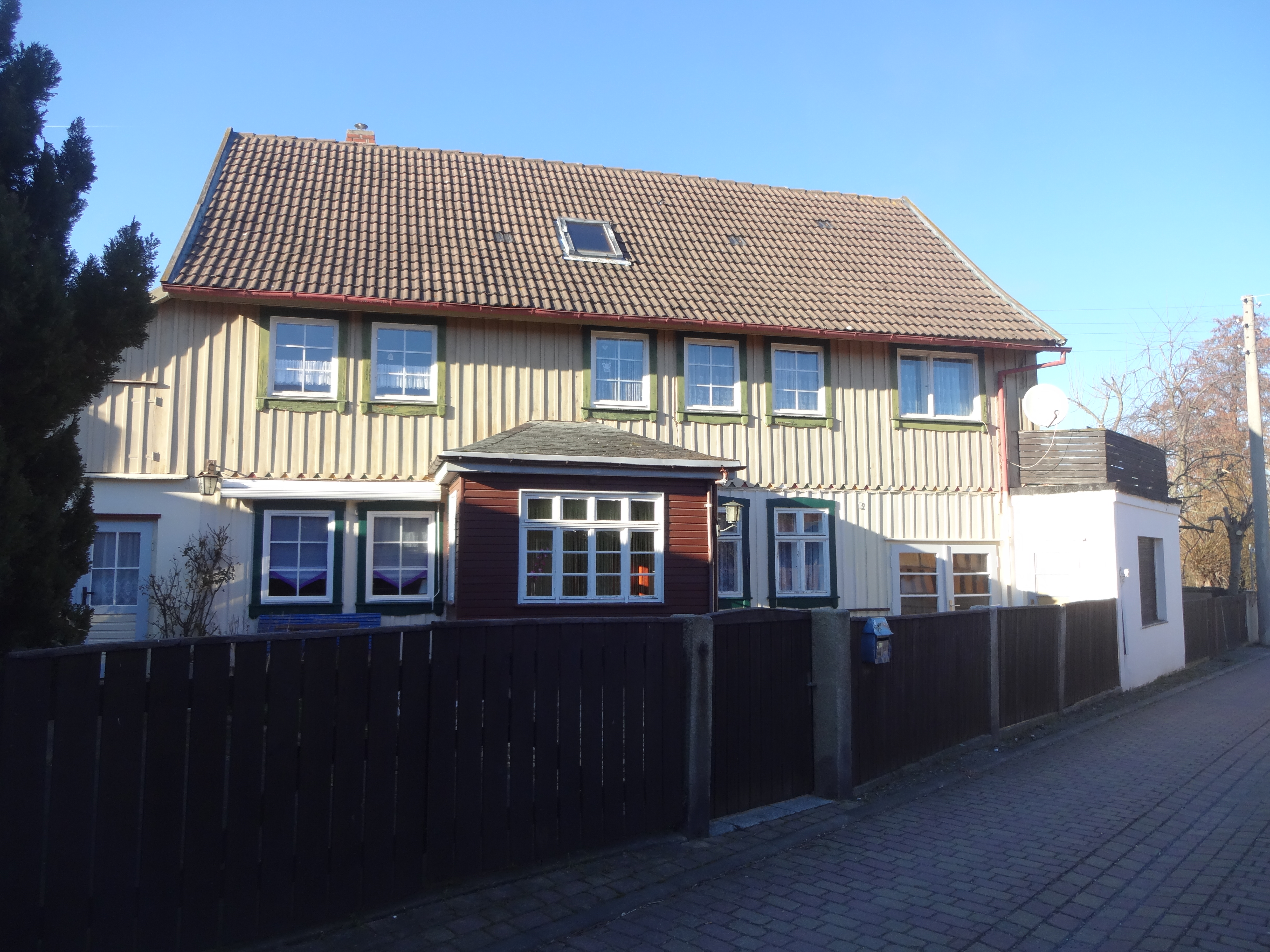 ehemalig denkmalgeschütztes Wohnhaus im Oehrenfelder Weg 2 in Darlingerode